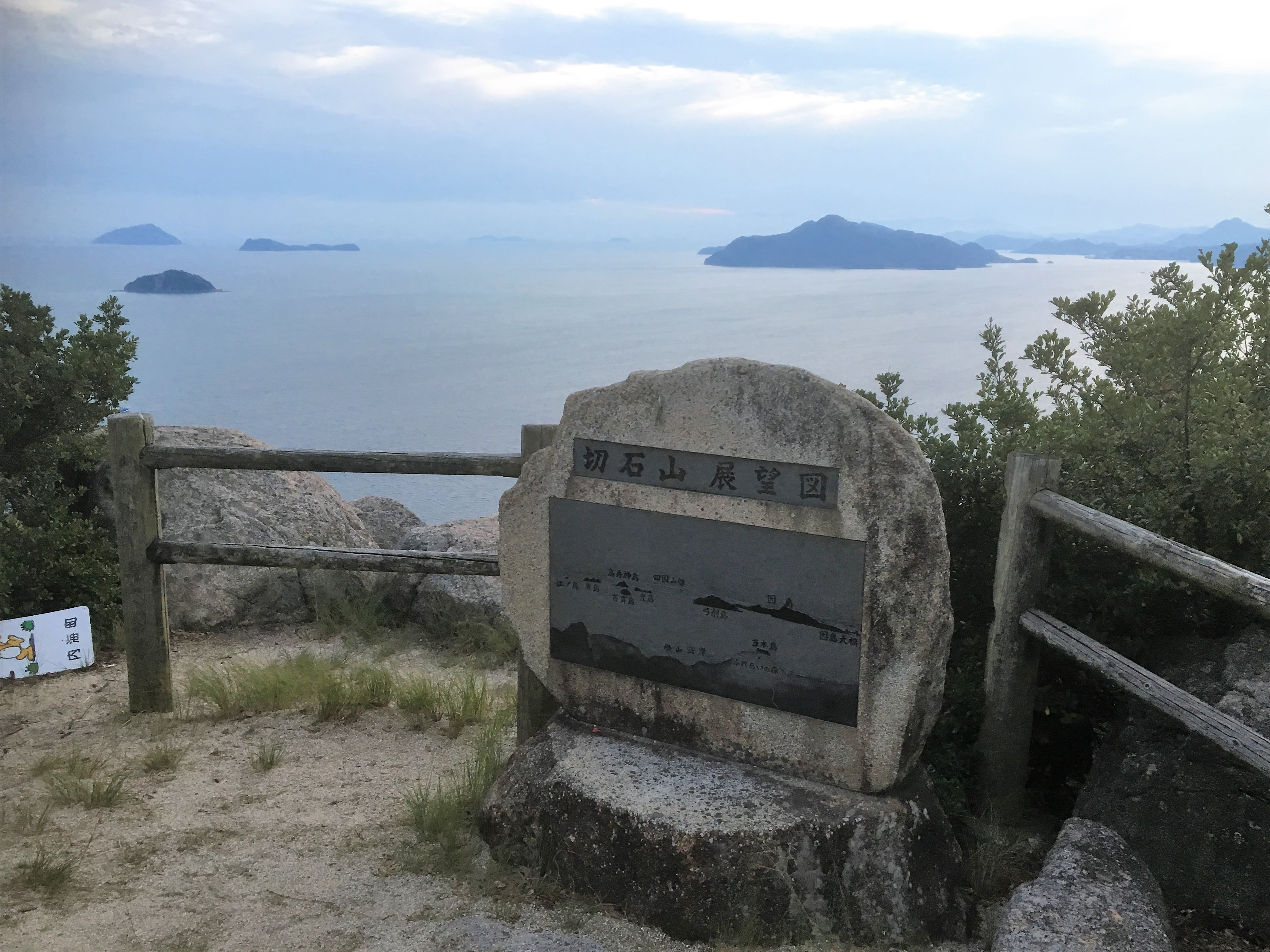 広島県福山市横島の王城切石山公園の石切山山頂展望台